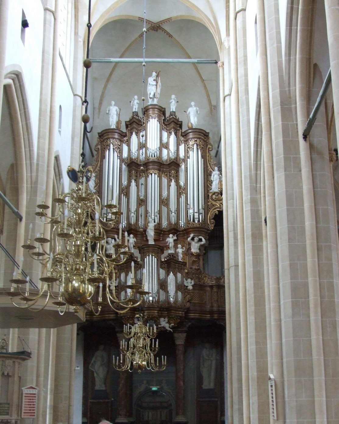 Hinzsch organ Kampen Bovenkerk